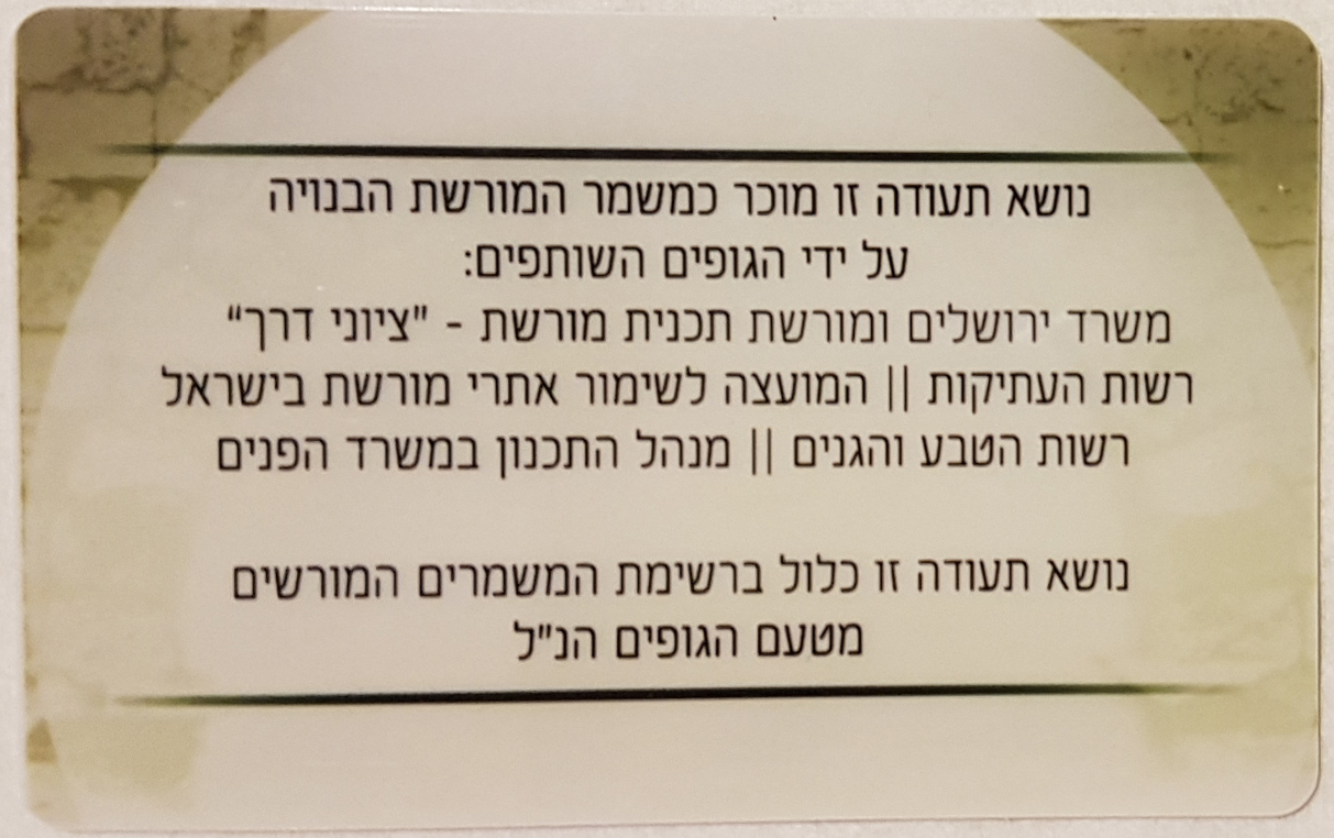 הגופים העומדים בהכרה של המשמר המוכר